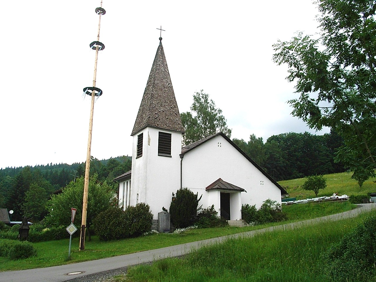 Filialkirche St. Gunther in Buchenau, Gemeinde Lindberg, Landkreis Regen, Bayern, Deutschland